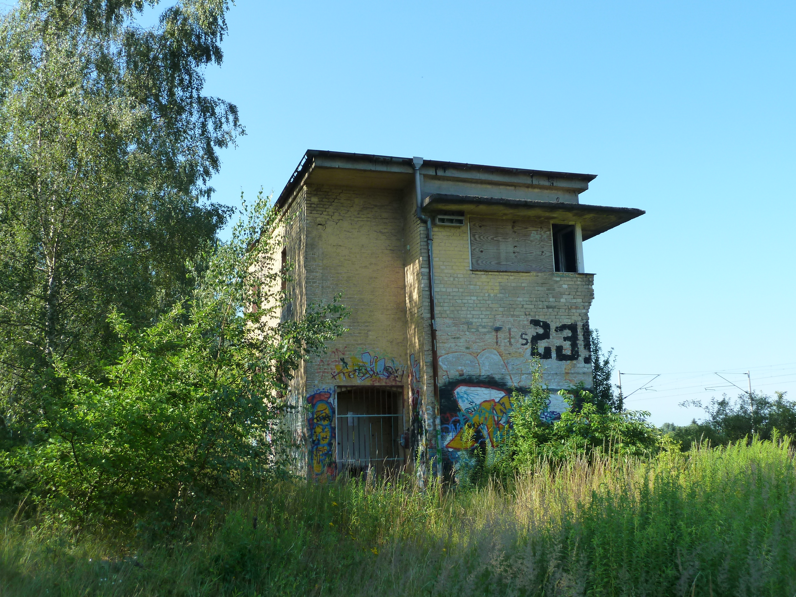 Bahnhof Teltow, Stellwerk des ehemaligen Hilfsrangierbahnhofs Großbeeren